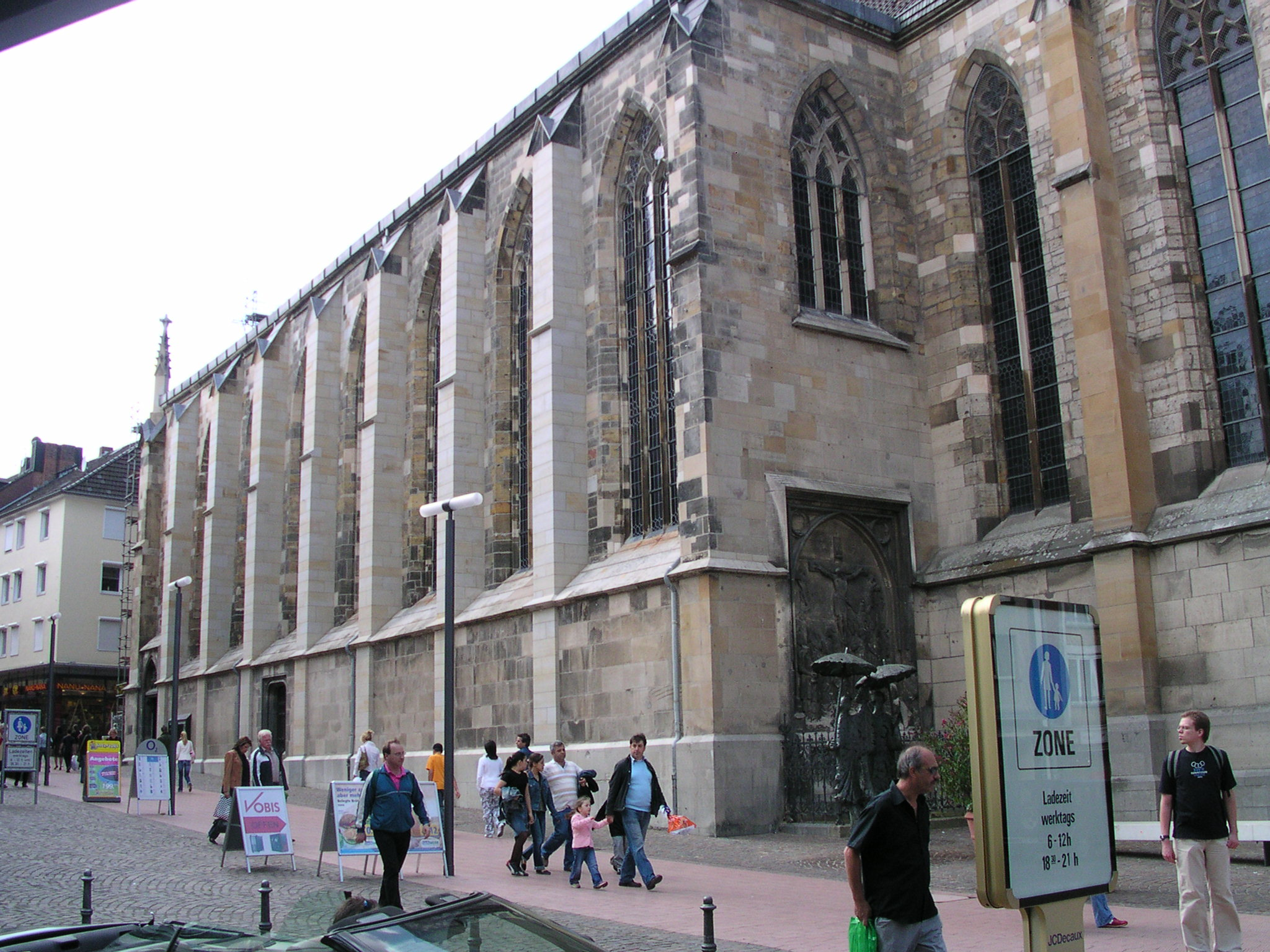 Aachen, Nikolauskirche